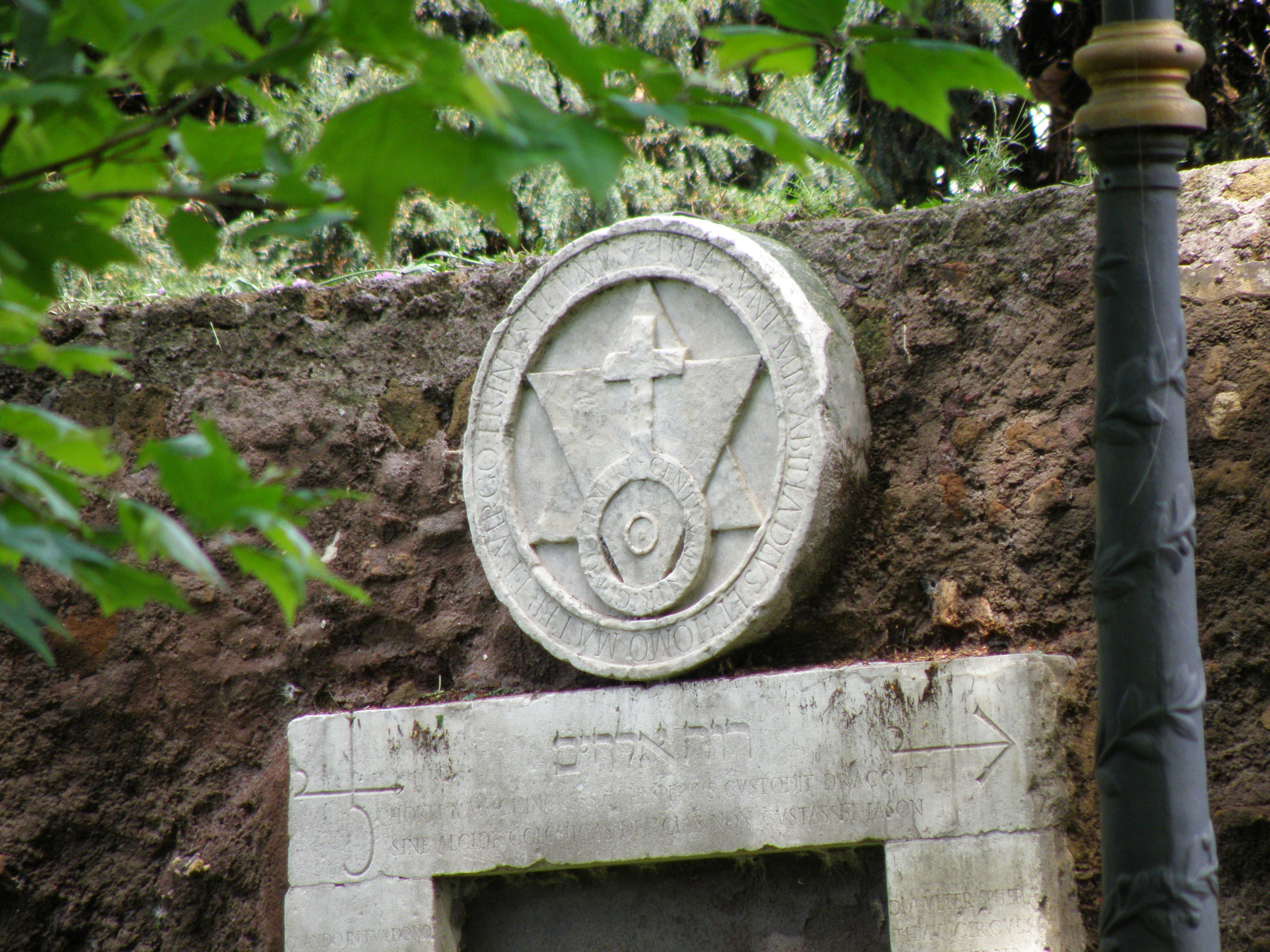 Rione XV Esquilino, Roma, Italy